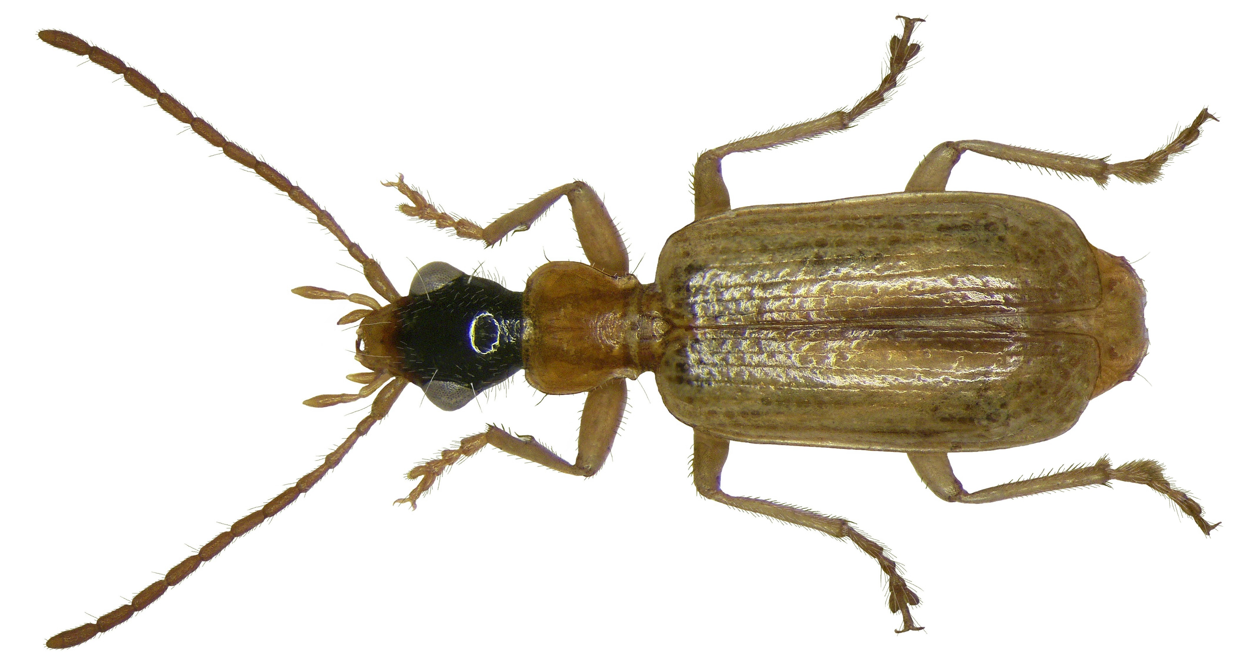 Familie: Carabidae Größe: 4,5-6 mm Verbreitung: Europa, Nordafrika, Sibirien, Syrien Ökologie: in Feuchtbiotopen Fundort: Holland, Beek Gld leg.det.W.Veldkamp, 1971 Foto: U.Schmidt, 2008